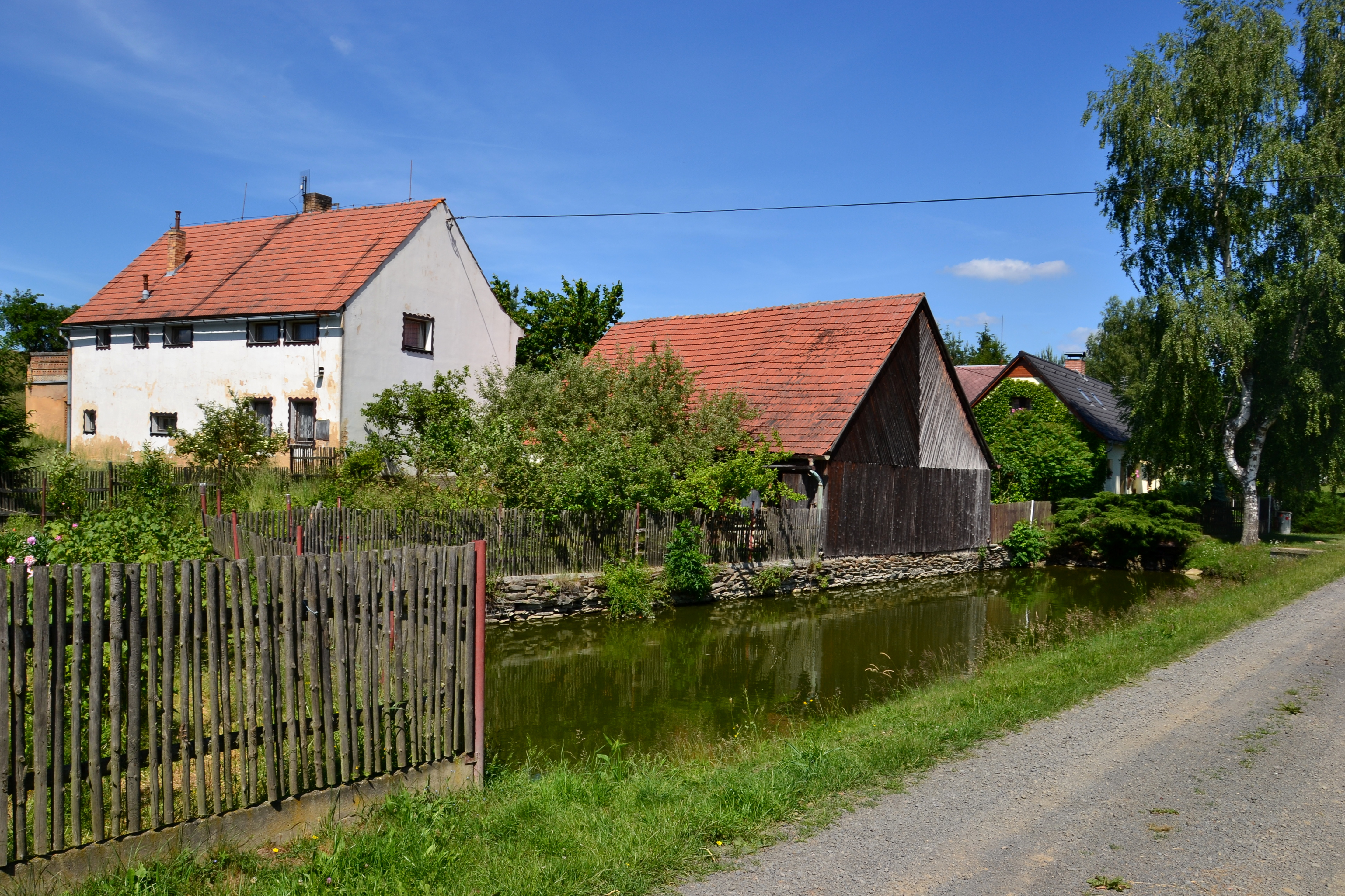 Malý rybník